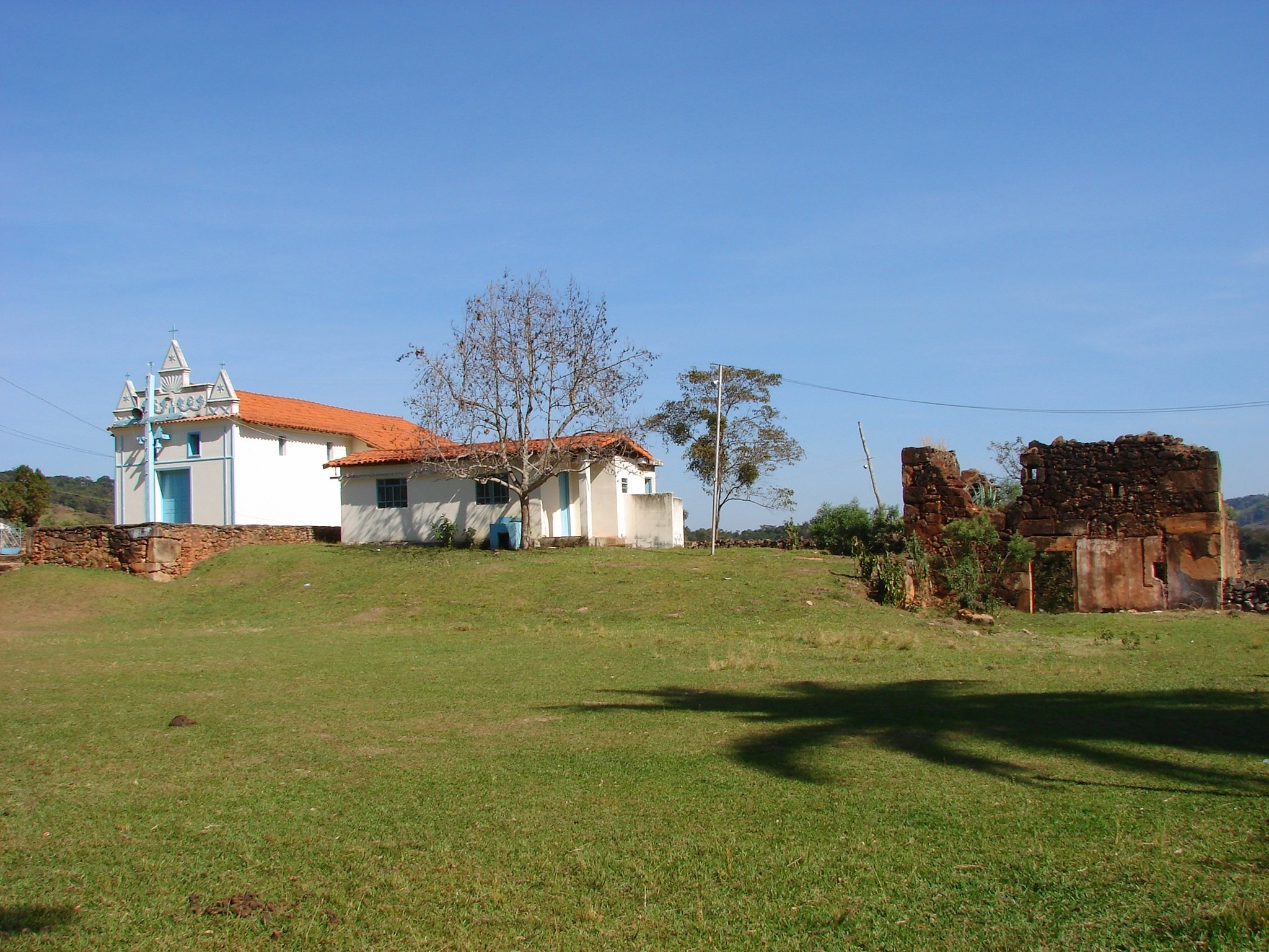 Distrito de São Caetano - Moeda/MG